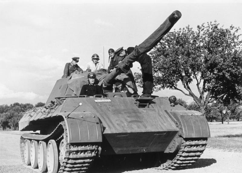 Panther wachsen aus Panzerstahl. Die geballte Kraft des neuen deutschen Panzers "Panther" tritt uns aus diesem Bild entgegen. Er wirkt heute vernichtend als Panzerzerstörer an der Feindfront.